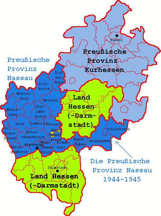 Die Preußische Provinz Nassau 1944-1945 mit Stadt- und Landkreisen sowie dem benachbarten Land Hessen-Darmstadt und der benachbarten Provinz Kurhessen.